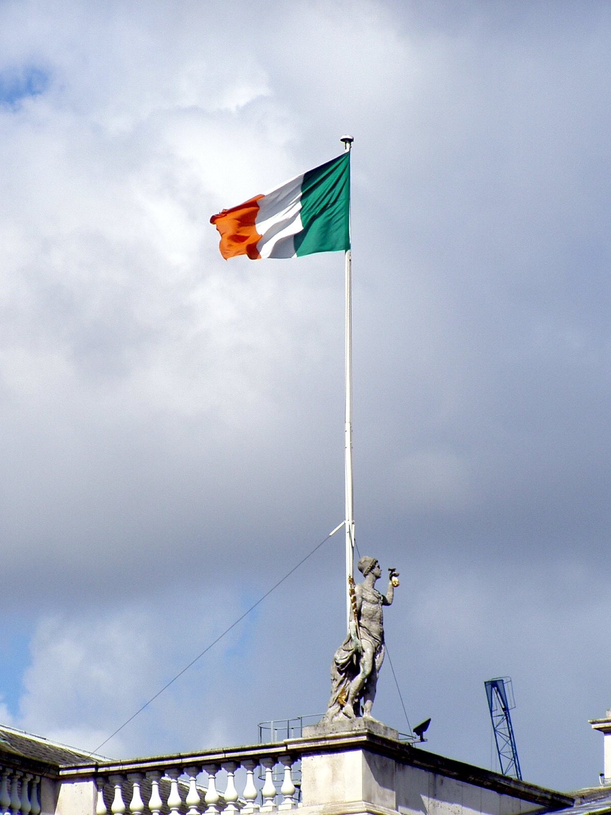 La tricolor irlandesa ondeando en la GPO de Dublín Description: Irish Flag on top of the GPO, Dublin, Ireland Source: Photographed it myself in august 2003 Photographer: Thorsten Pohl Thpohl